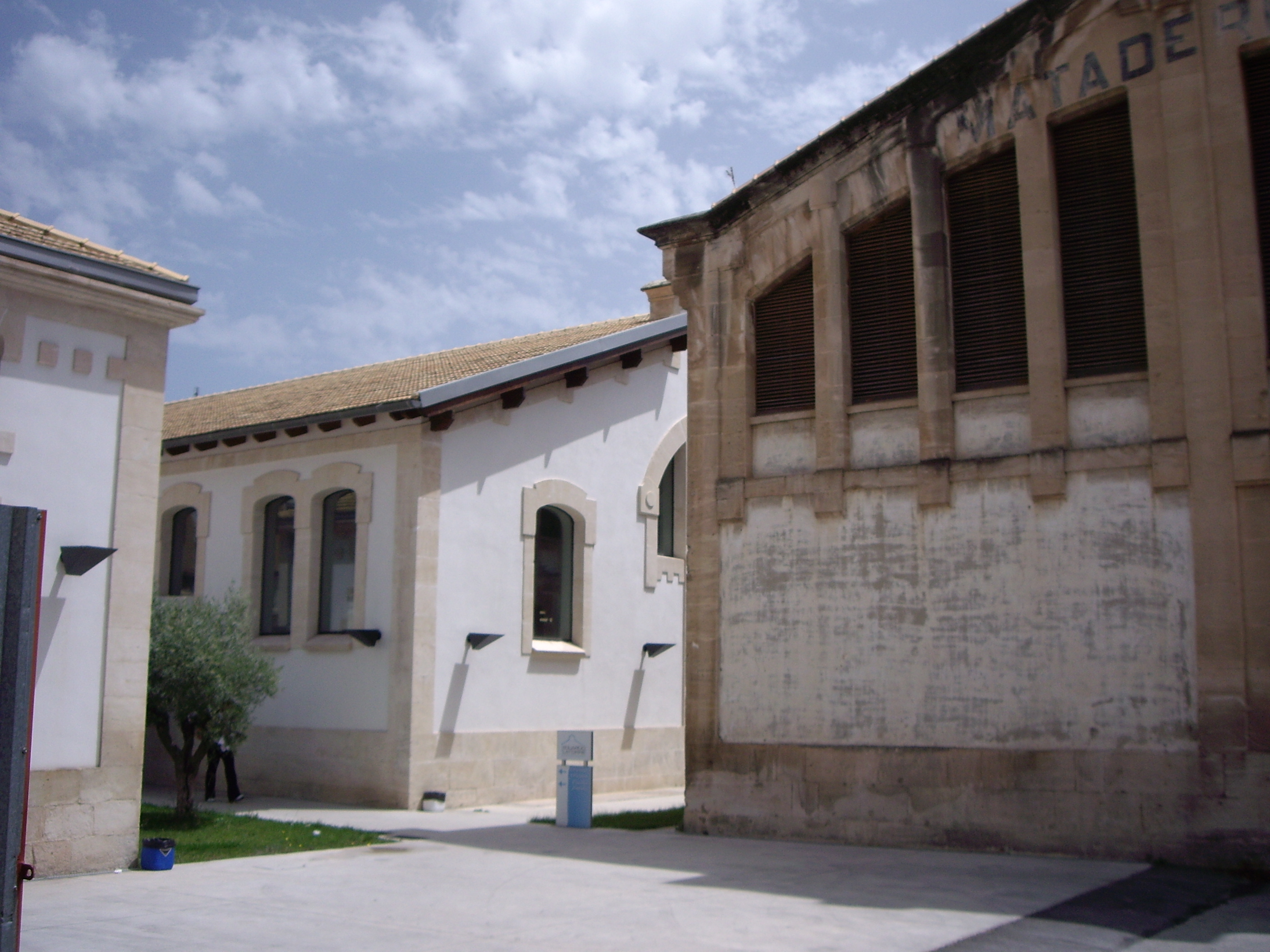 Zona esportiva a l'antic escorxador d'Alcoi